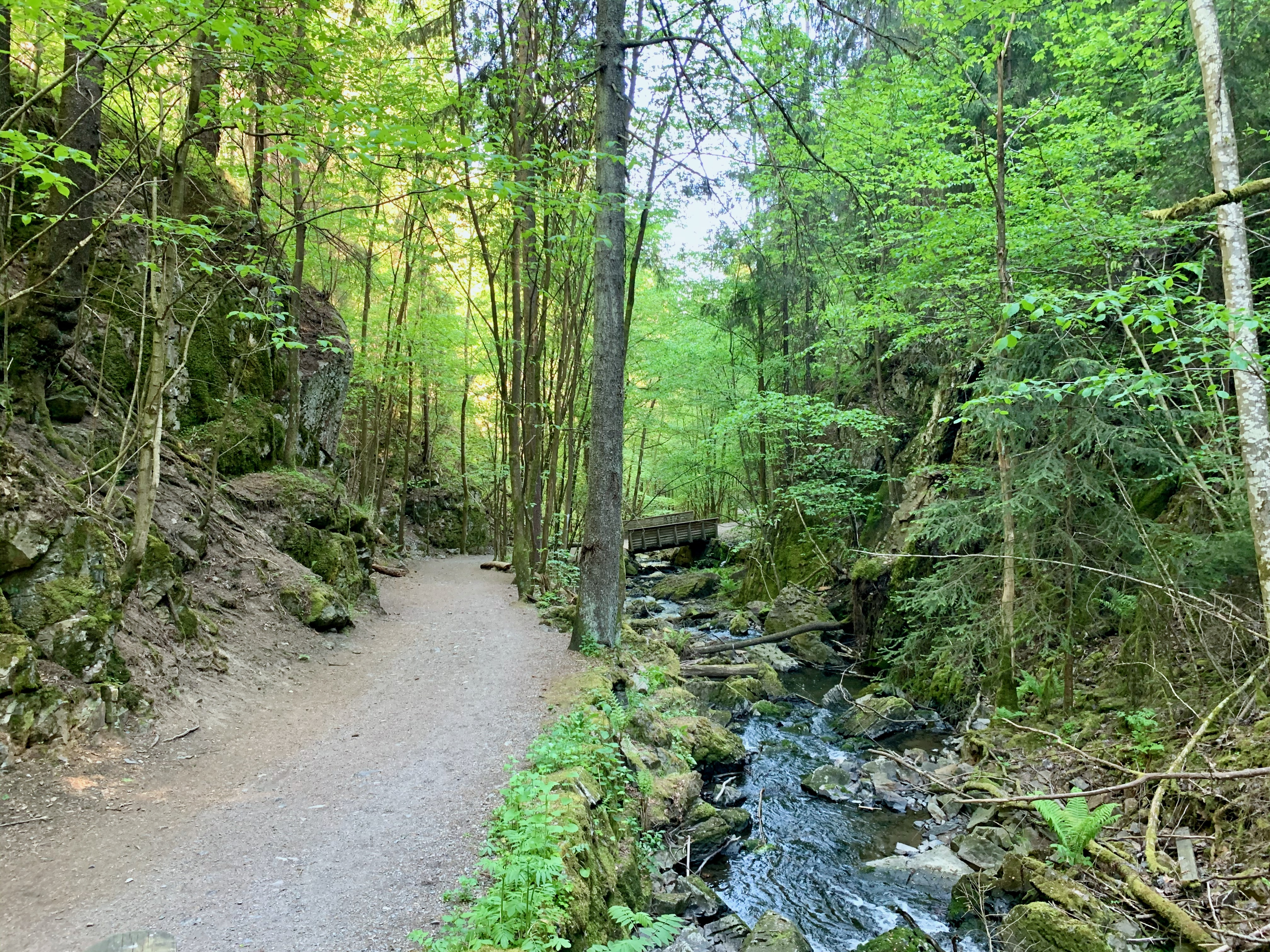 Mærradalen i Oslo.